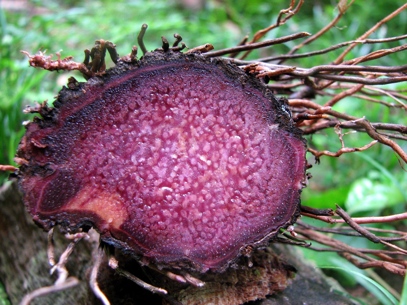 നീലക്കാച്ചിൽ മുറിച്ചത്